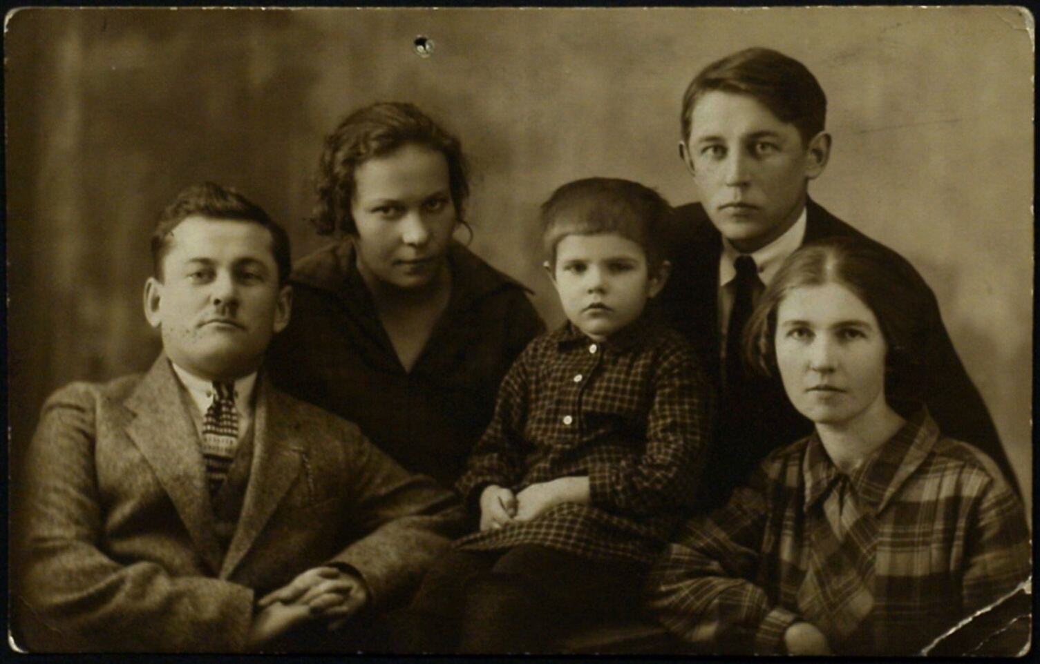 Беларуская (тарашкевіца): Андрэй Антонавіч Шашалевіч (А. Мрый) (зьлева) і Васіль Антонавіч Шашалевіч з роднымі